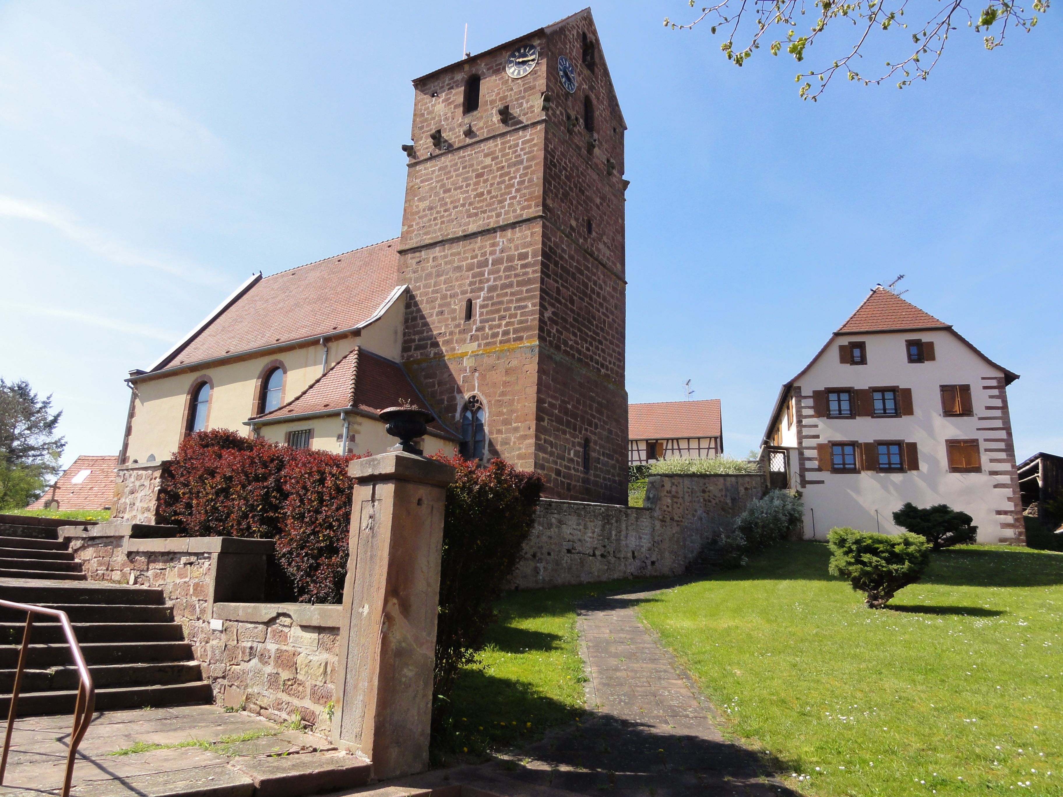 Alsace, Bas-Rhin, Allenwiller, Église protestante Saint-Michel (XIIIe-XVIIIe)